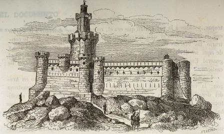 Los Guevara fueron una de las familias nobles de Euskadi. En la localidad que lleva su nombre, construyeron primero un castillo (en el siglo XI) en lo alto de una colina. Siglos más tarde, en el XIV, se edificó la Torre y Palacio de Guevara a los pies de esa colina. No obstante, la tragedia asoló a estos edificios y sus habitantes durante la II Guerra Carlista. Ambos fueron asediados y quedaron totalmente destruidos. Durante años, este lugar ha quedado vacío pero, últimamente, el palacio ha sido reconstruido en parte.